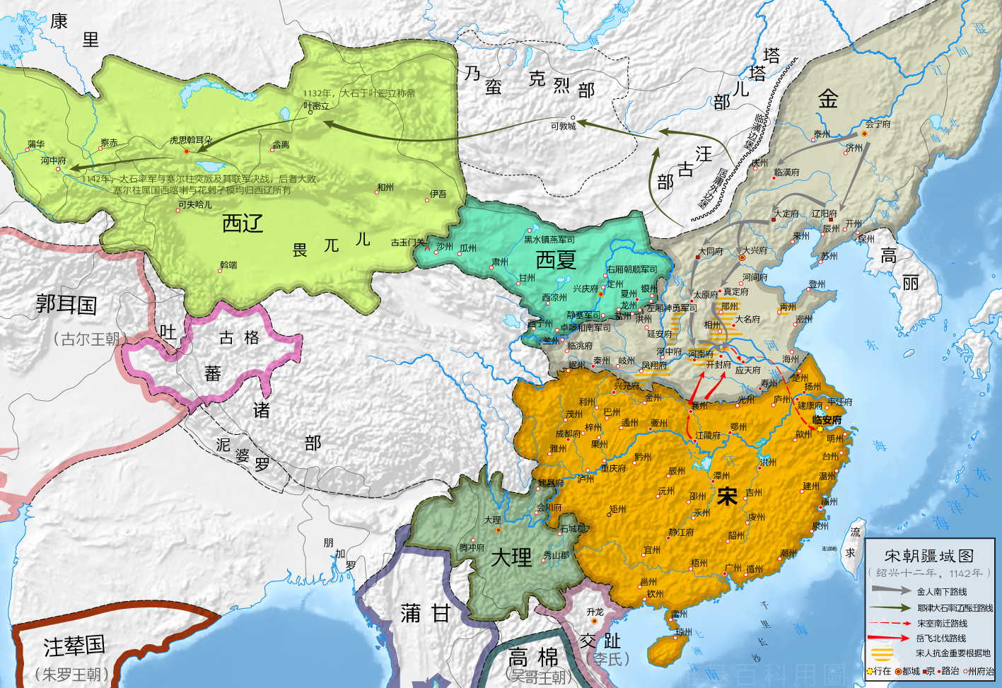 南宋疆域图